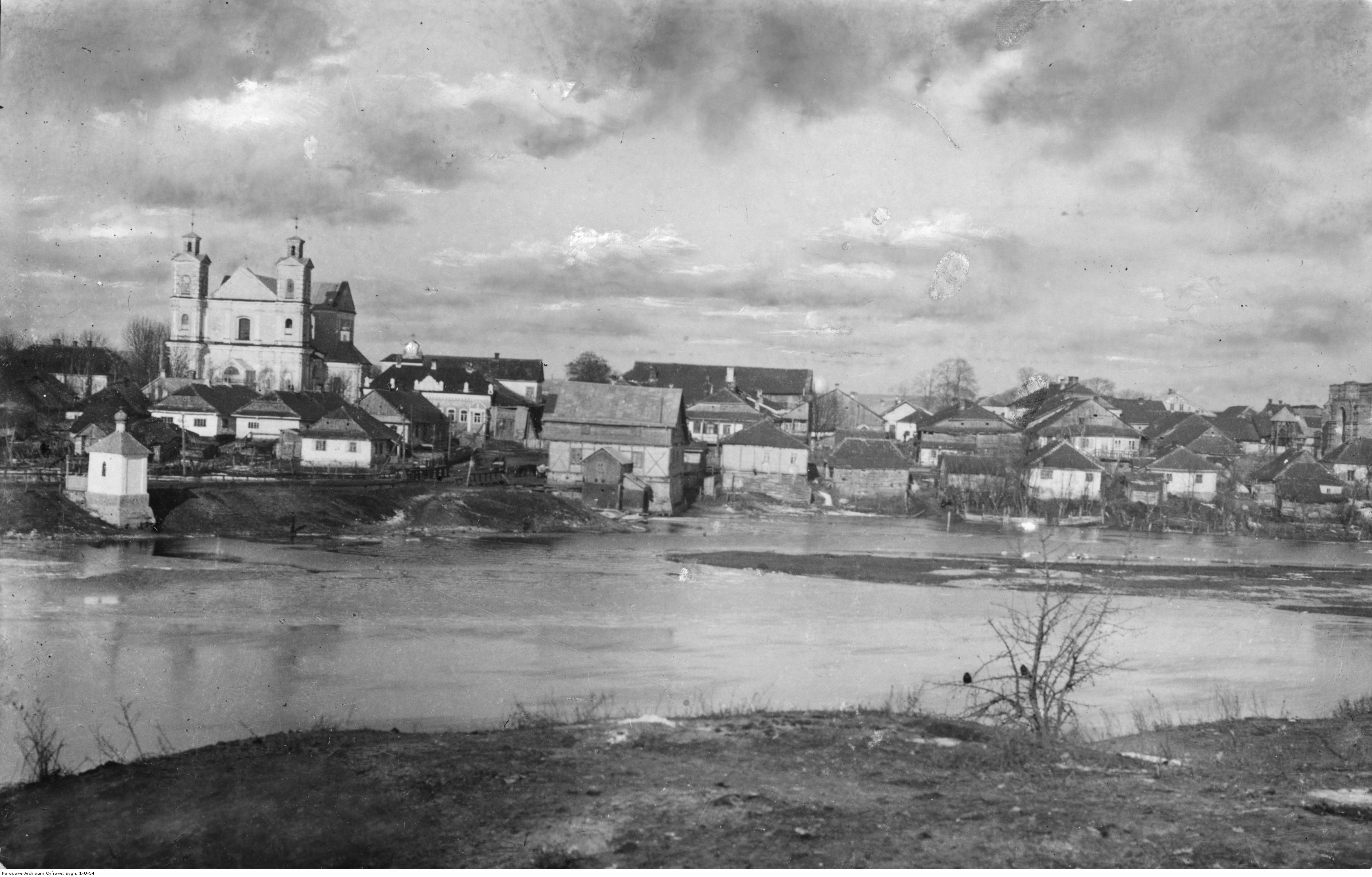 Beresteczko w województwie wołyńskim. Panorama miejscowości od strony rzeki Styr; z lewej widoczny kościół Trójcy Świętej. Koncern Ilustrowany Kurier Codzienny - Archiwum Ilustracji. Sygnatura: 1-U-54